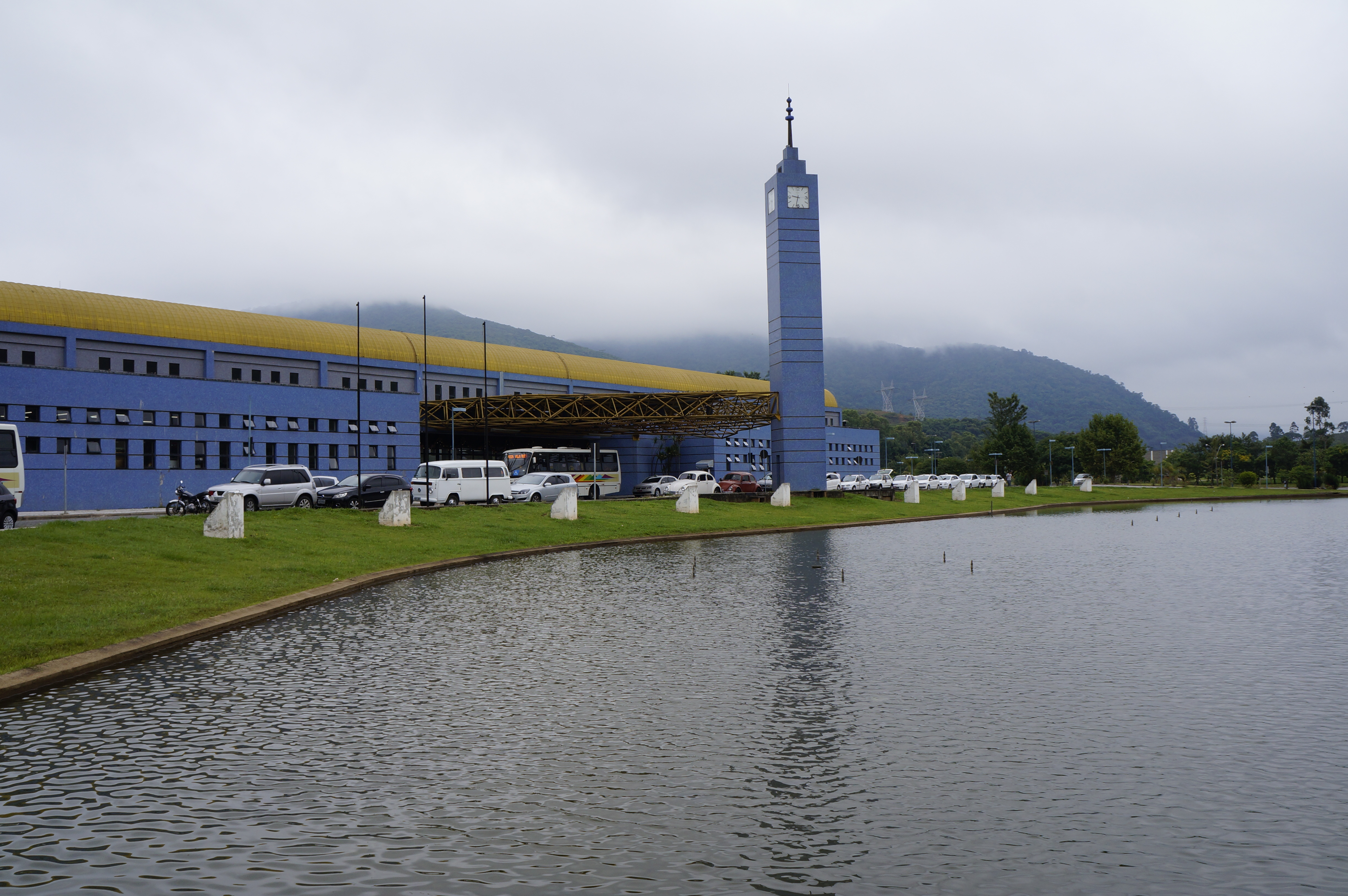 Rodoviária